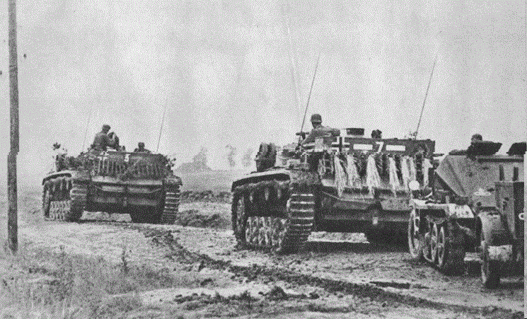 Una colonna corazzata tedesca in movimento verso la testa di sbarco di Salerno